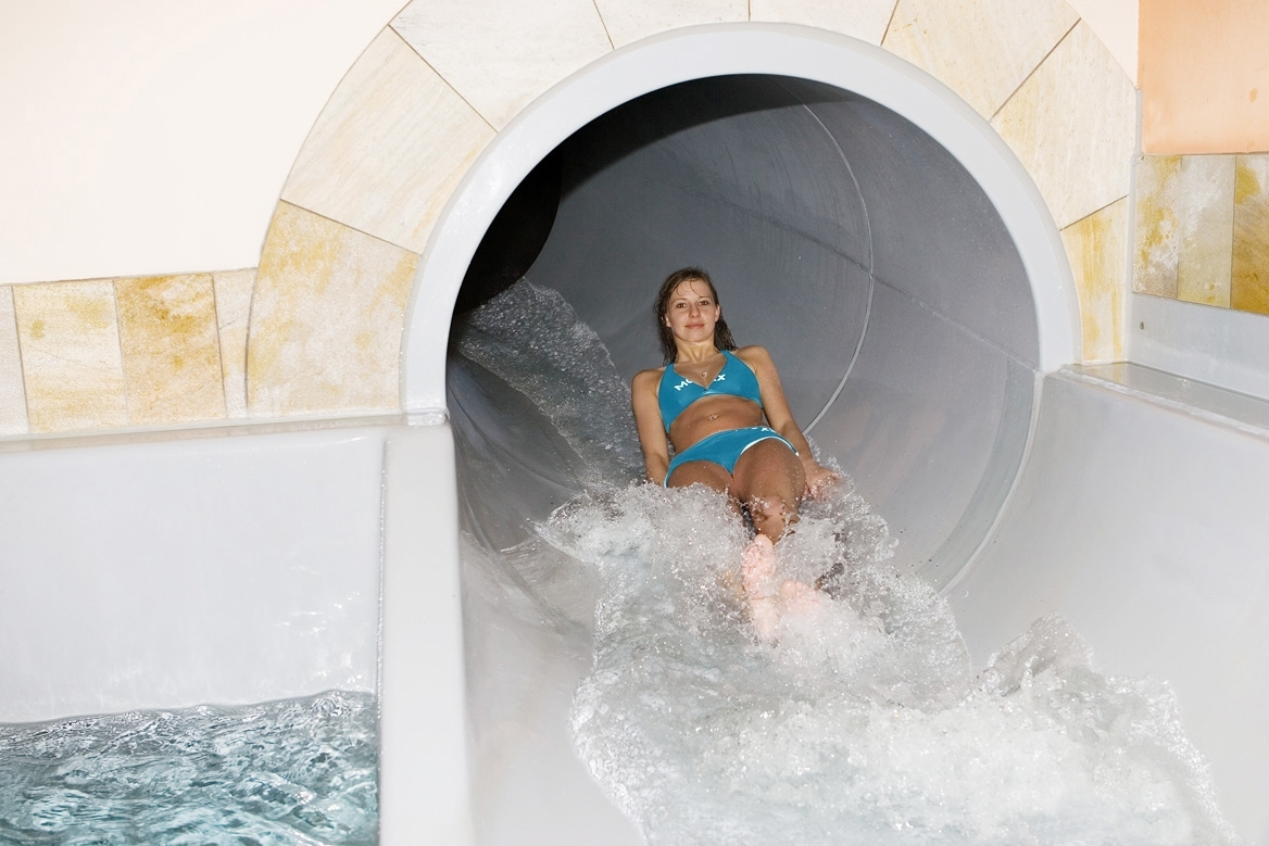 Deitsch: Rutsche